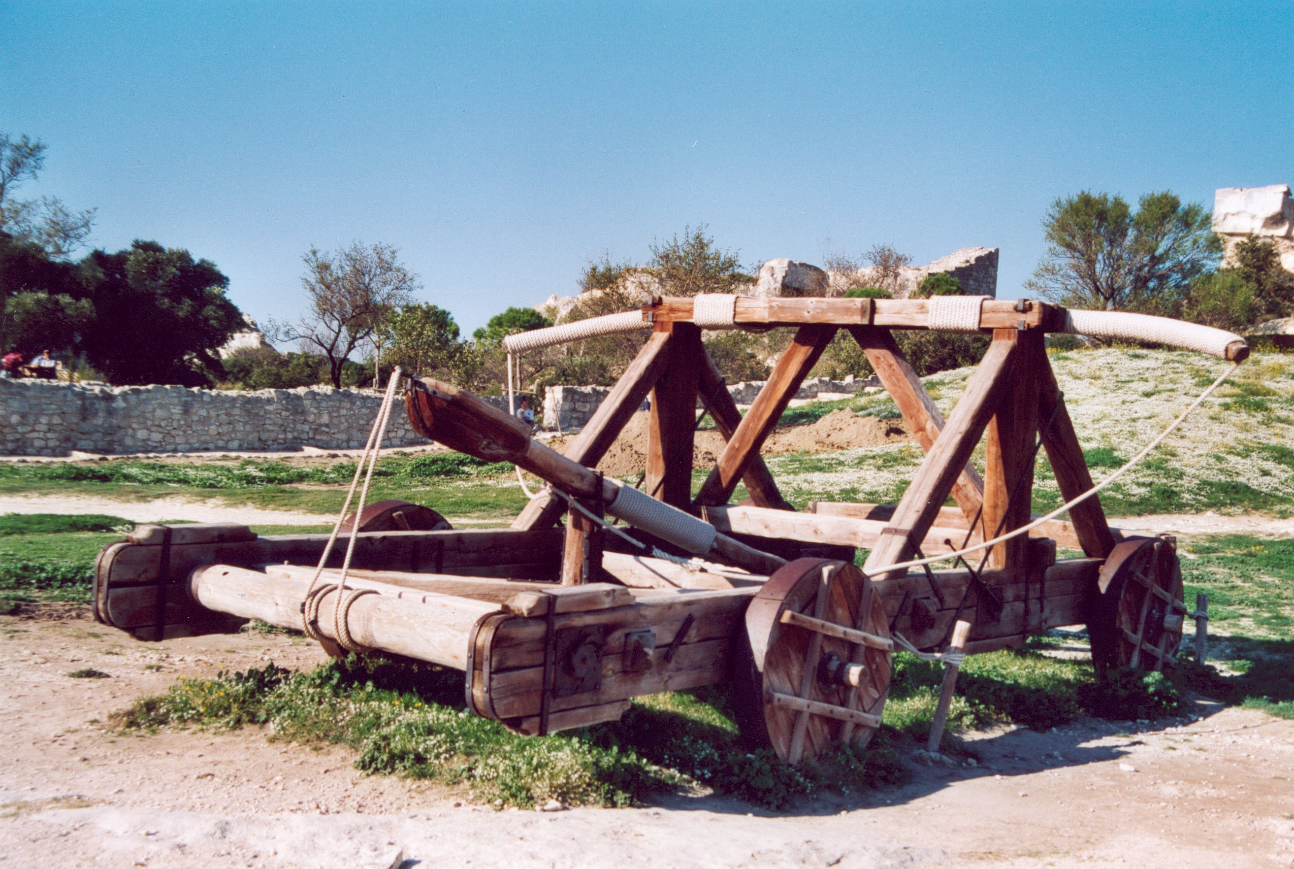 Les Baux-de-Provence Bouche du Rhône France Machine de guerre Photographie prise par Patrick GIRAUD